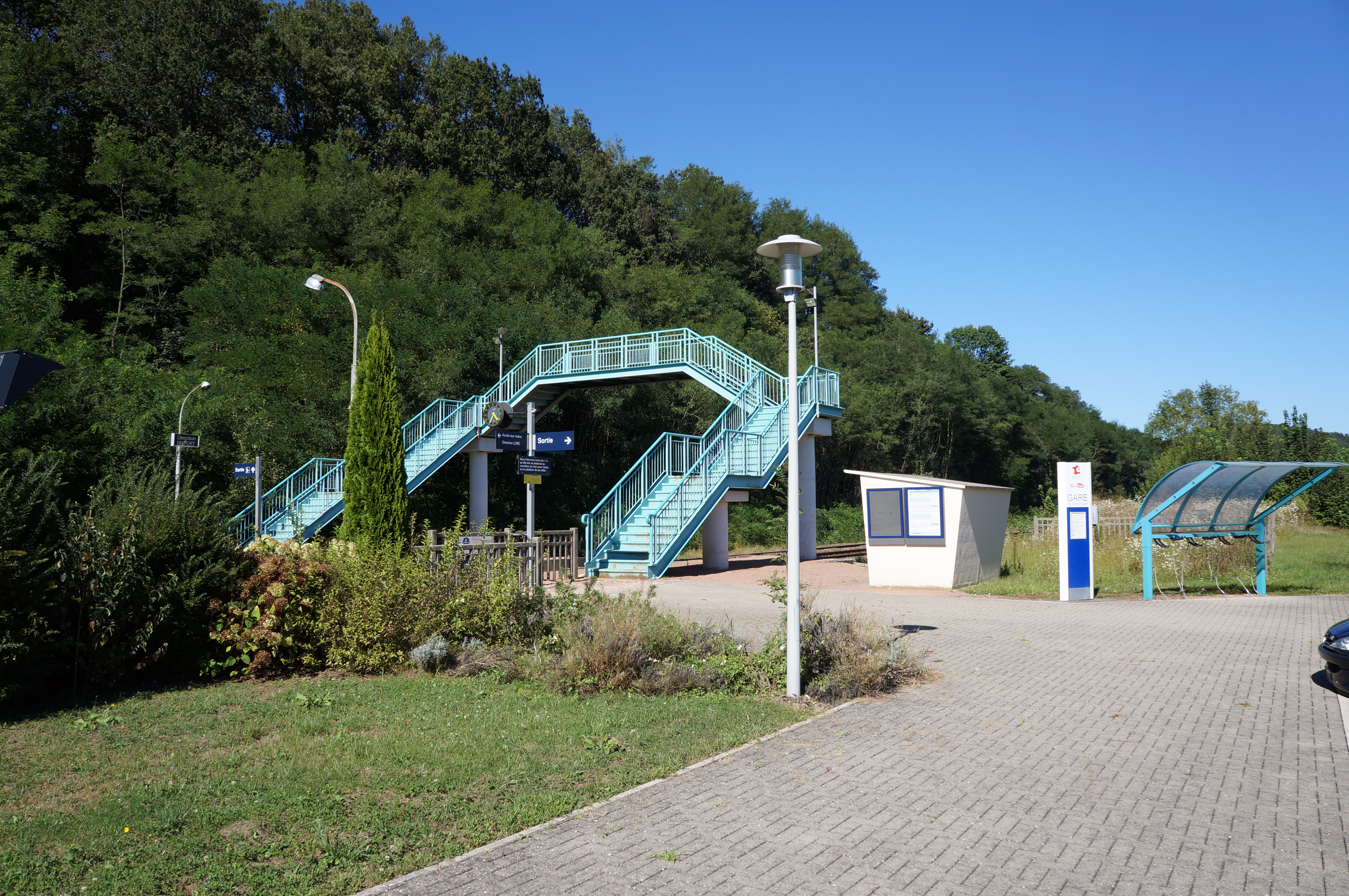 La gare de Ronchamp en Haute-Saône dans l'est de la France. Vue d'ensemble